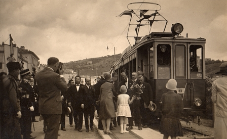 Tranvia elettrica di Offida, foto ufficiale dell'inaugurazione